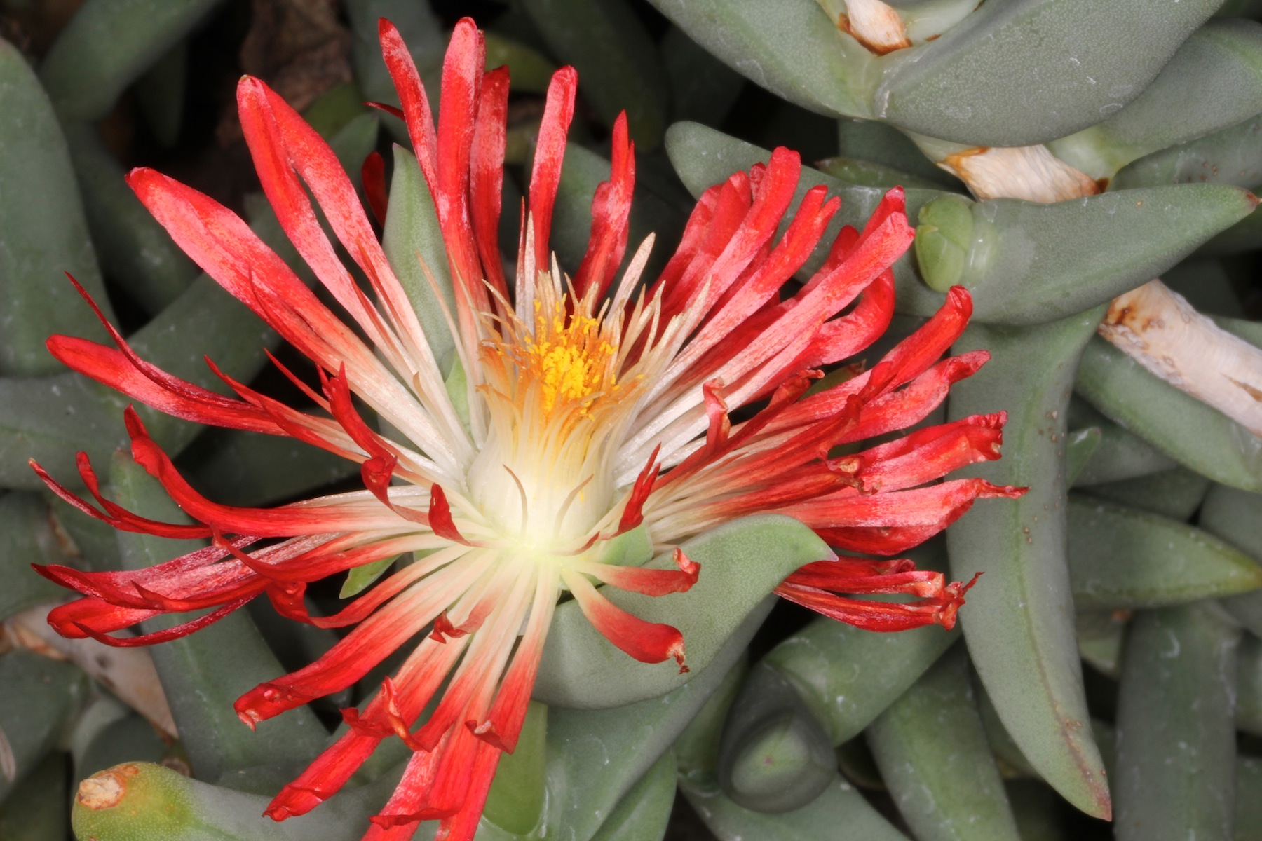 Astrida longifolia